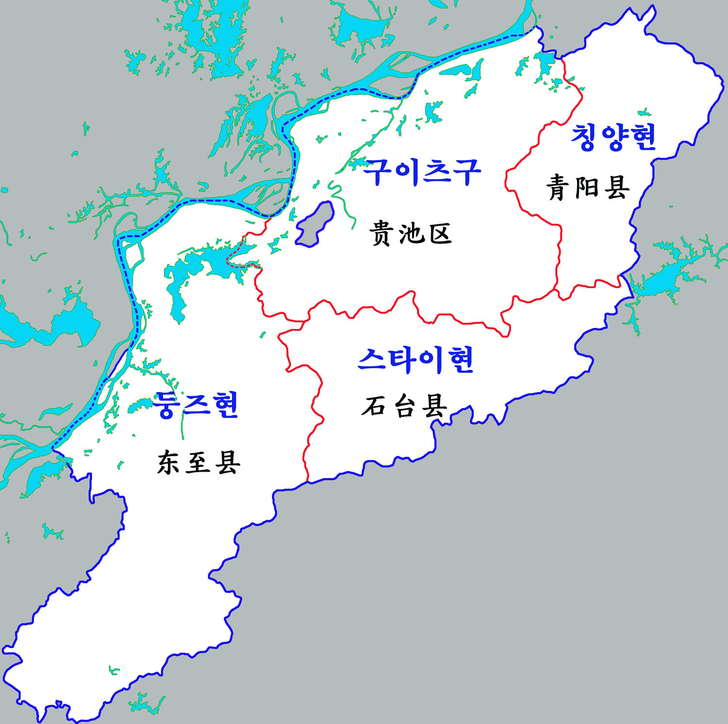 츠저우시 현급구역도